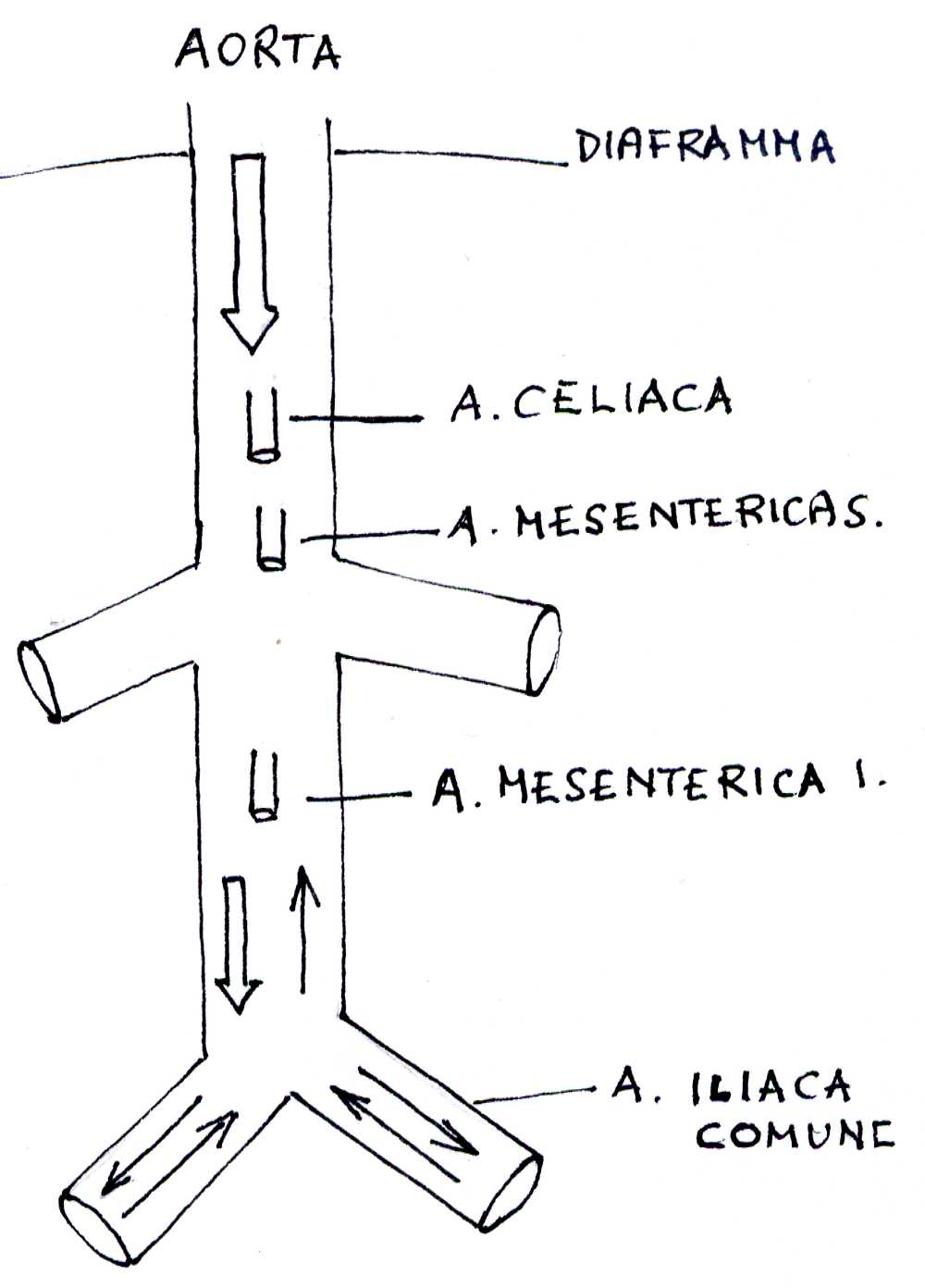 Flusso sanguigno nell'aorta sottodiaframmatica.